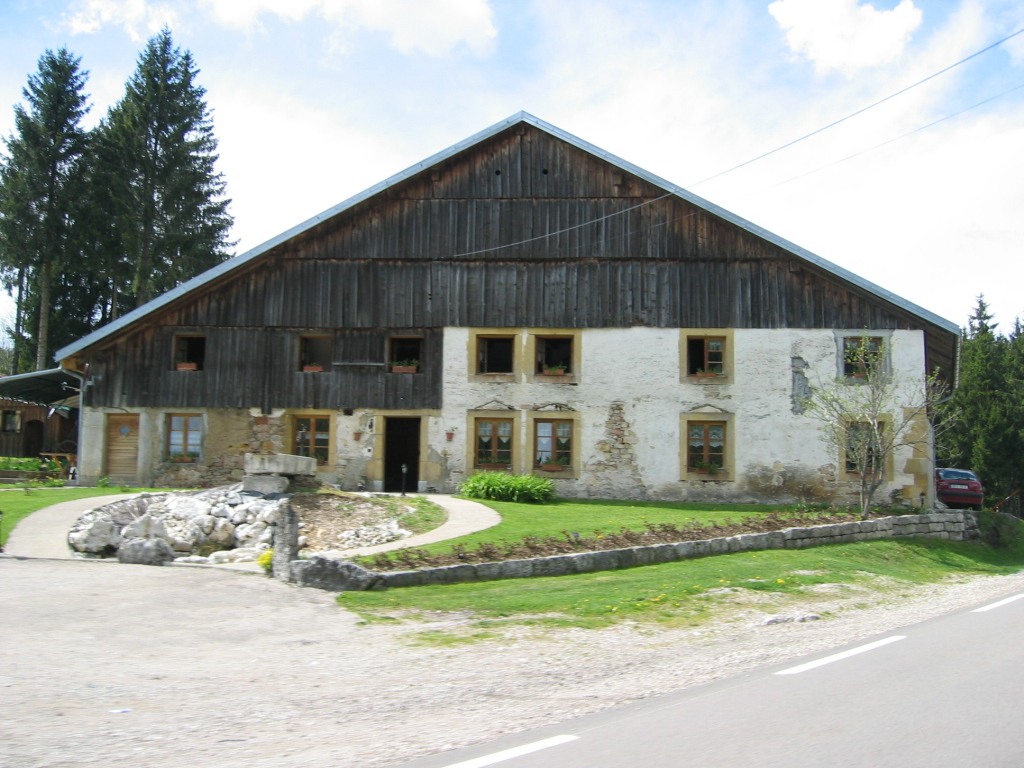 Maison traditionnelle du Haut Doubs - France